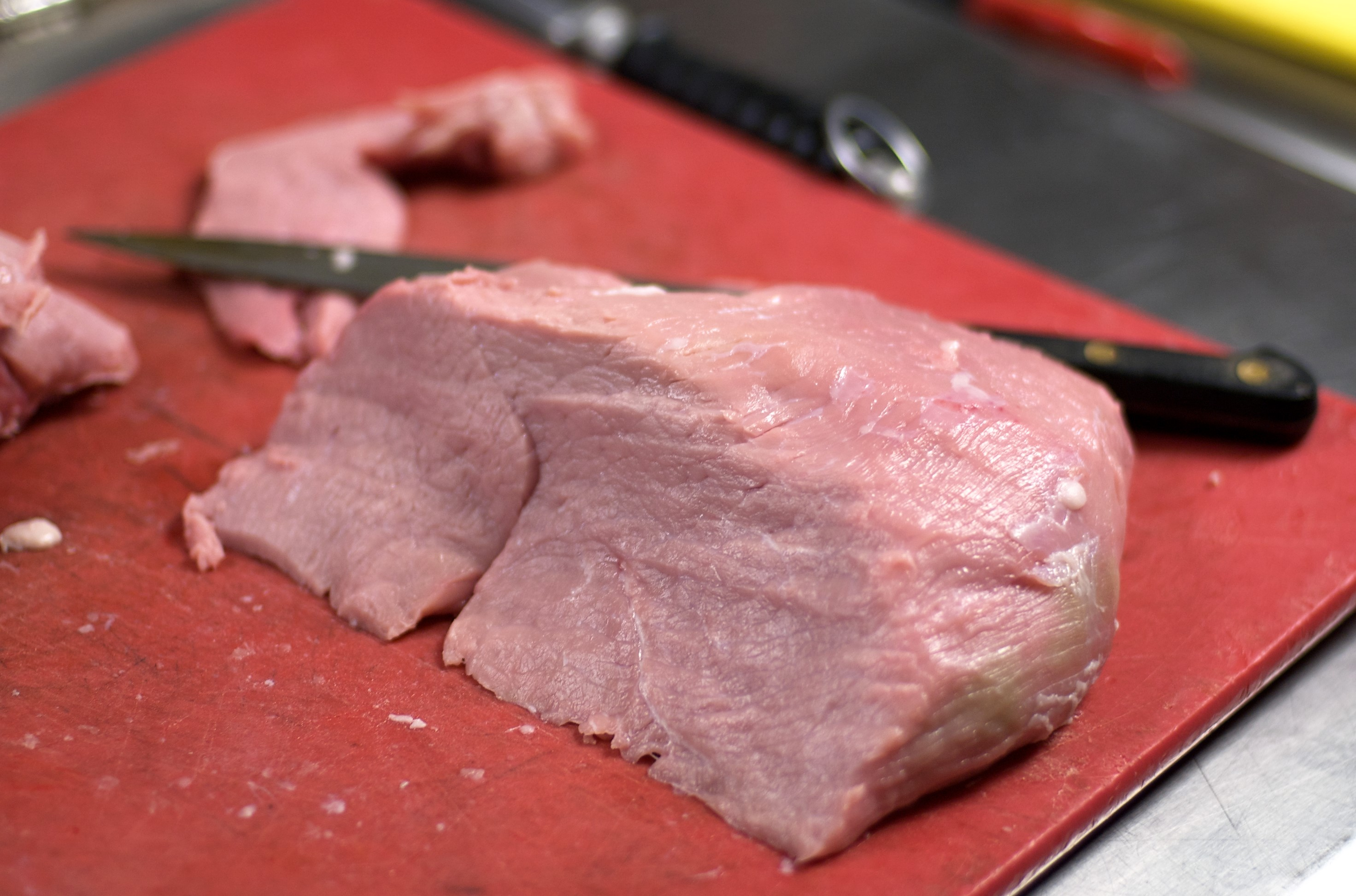 Kalbfleisch (aus der Nuss, hier nach dem Parieren und beim Abschneiden von Filetscheiben).